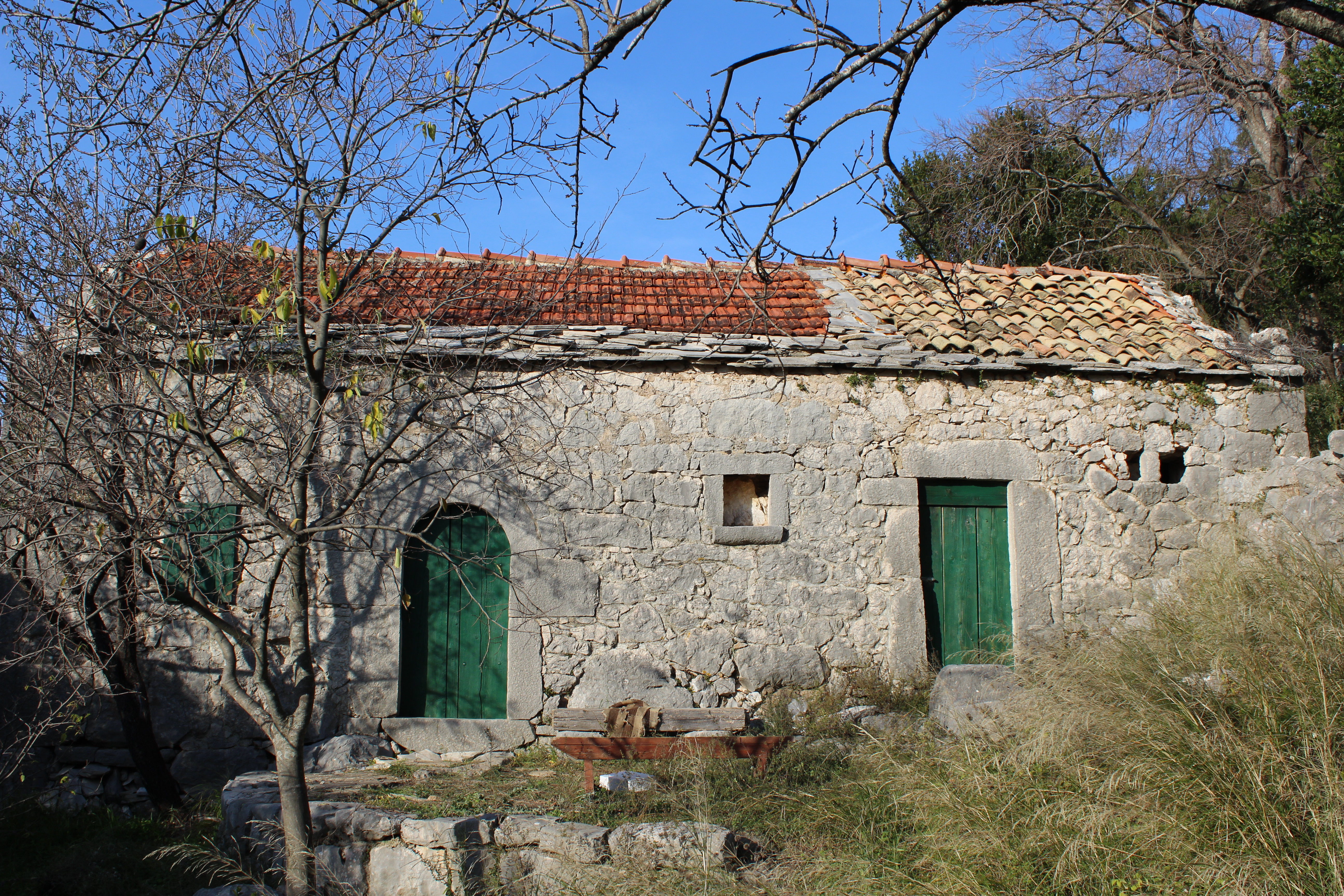 Obnovljena kuća u Oštrovcima